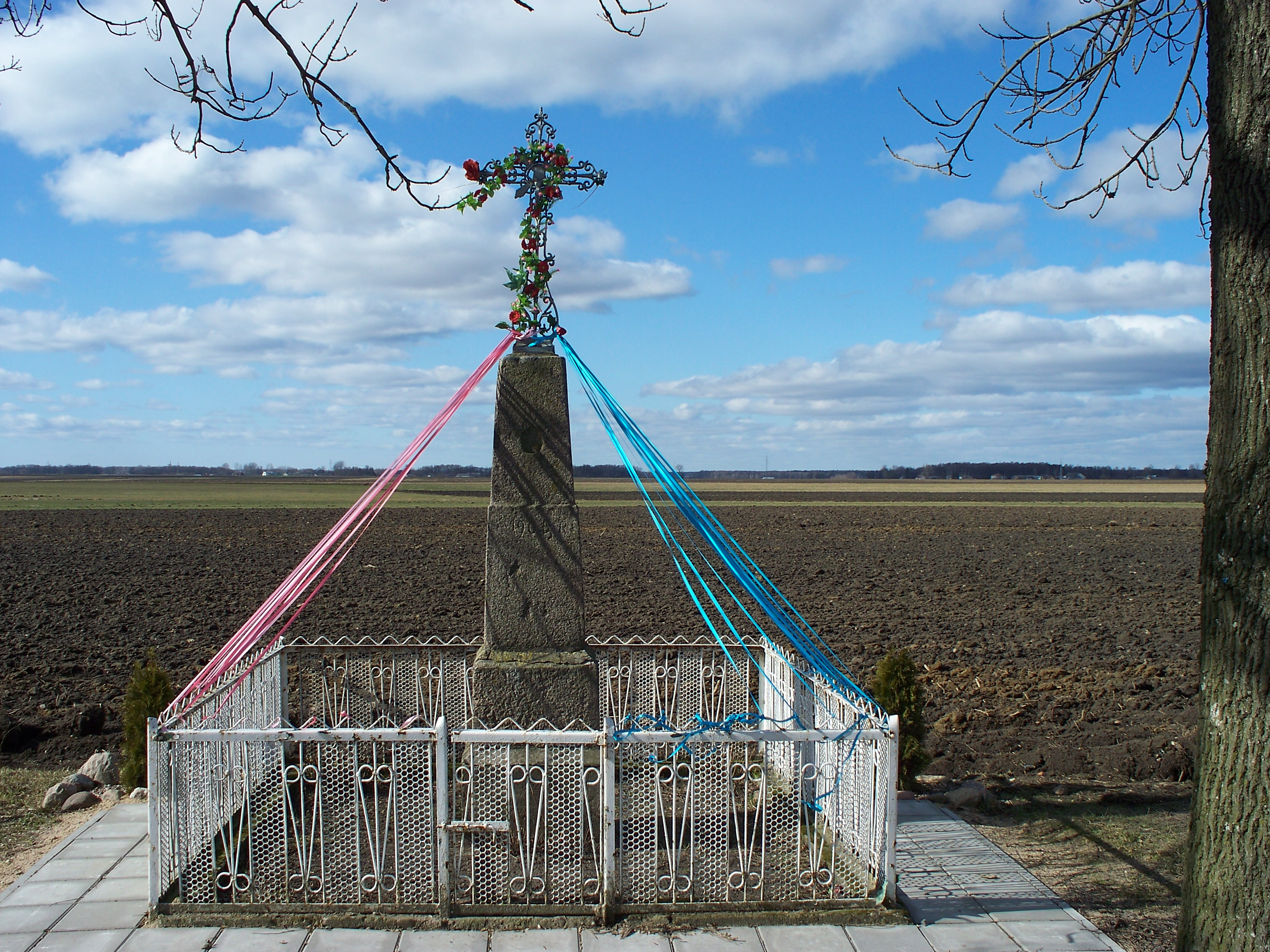 Krzyż ten powstał w 1908 roku.